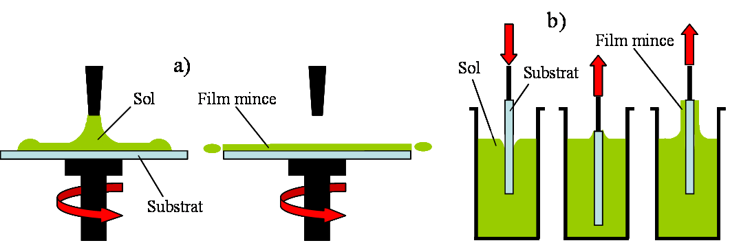 Schéma représentant le principe a) de la centrifugation et b) du trempage pour la préparation de film mince à partir de solution. Auteur : Frédéric Chaput, réalisé avec un programme de dessin. Licence GFDL Frédéric Chaput